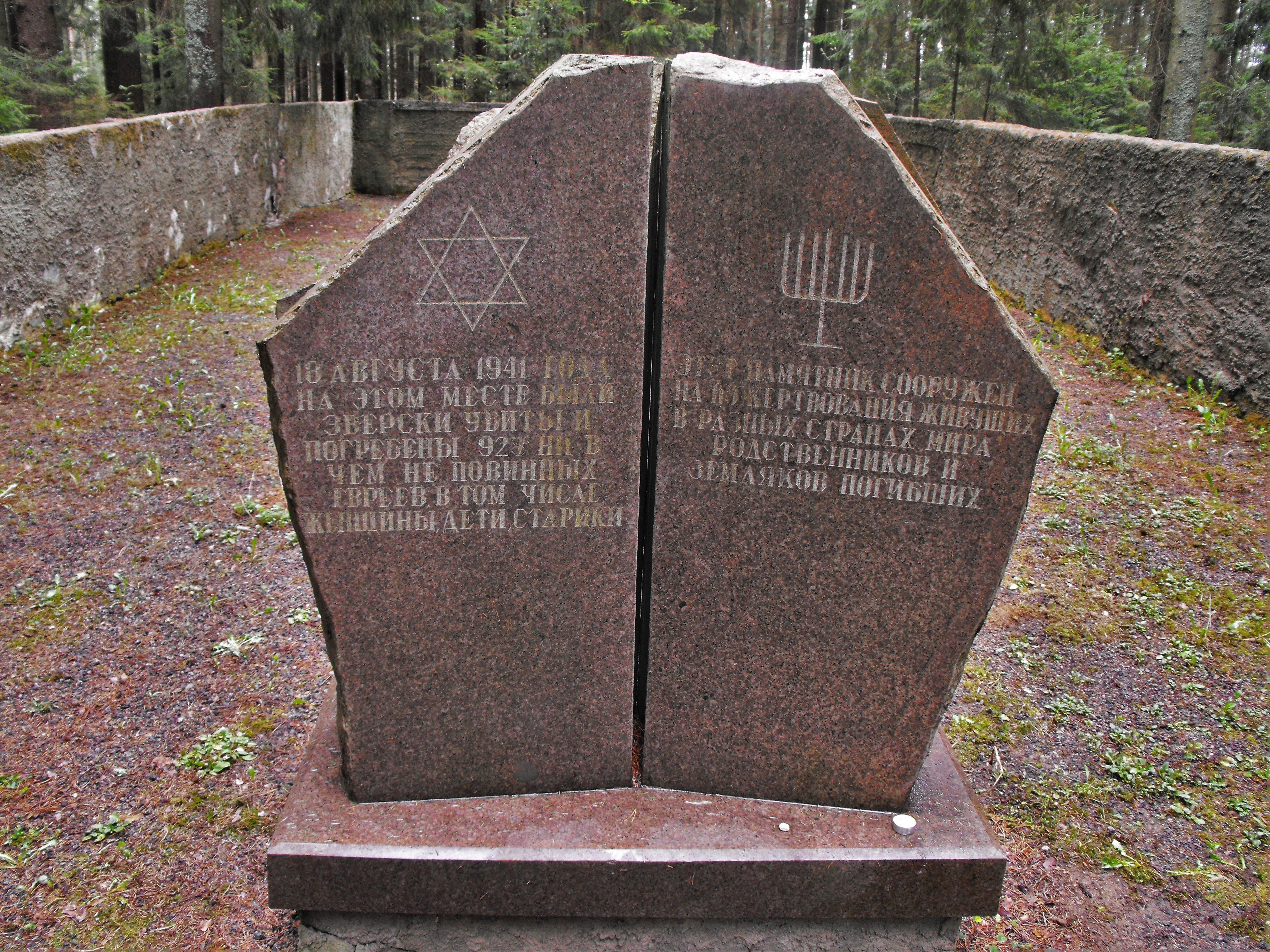 Место убийства нацистами евреев из гетто Зембина